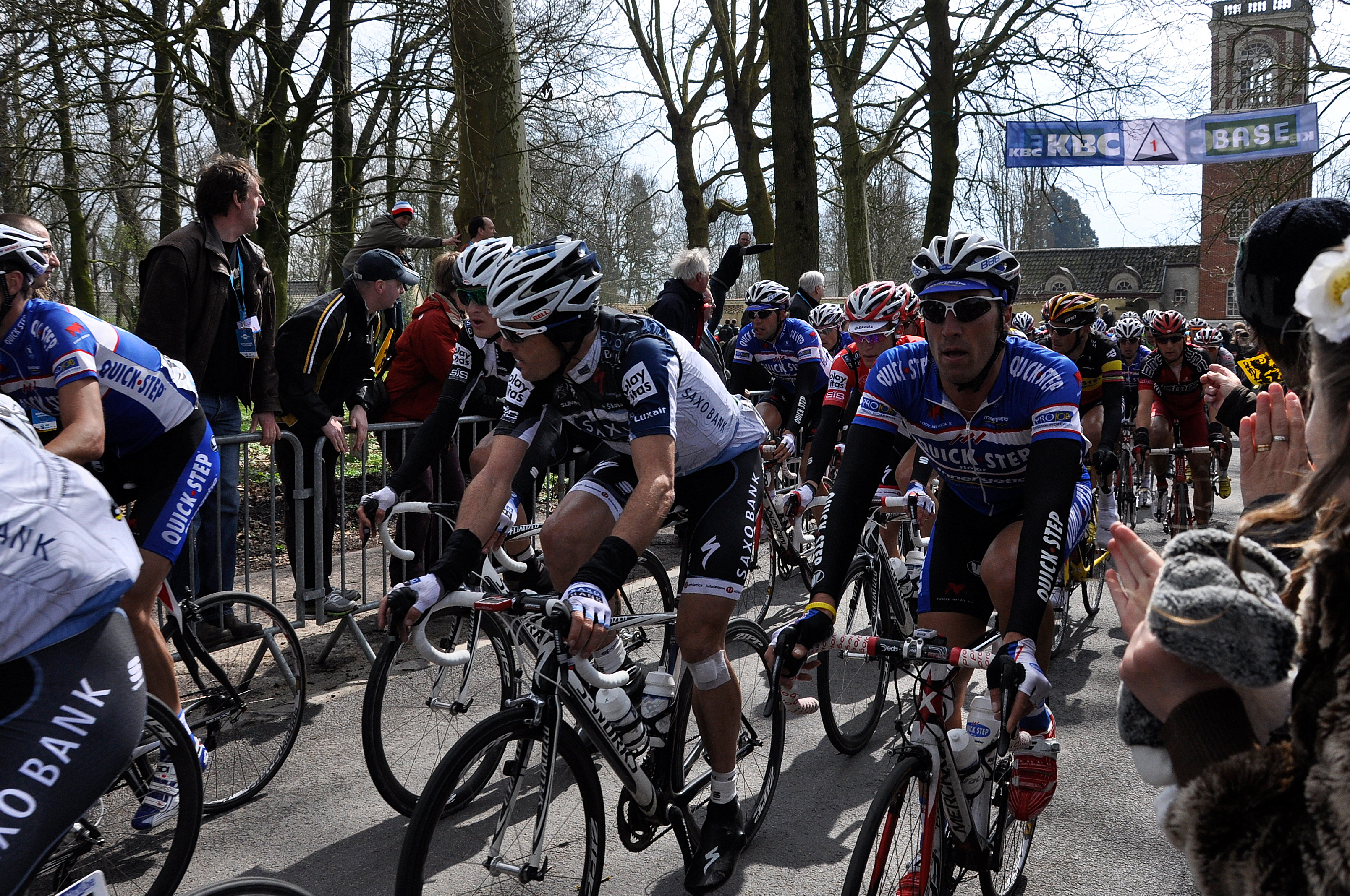 Ronde van Vlaanderen 2010 - Den Ast te Mullem